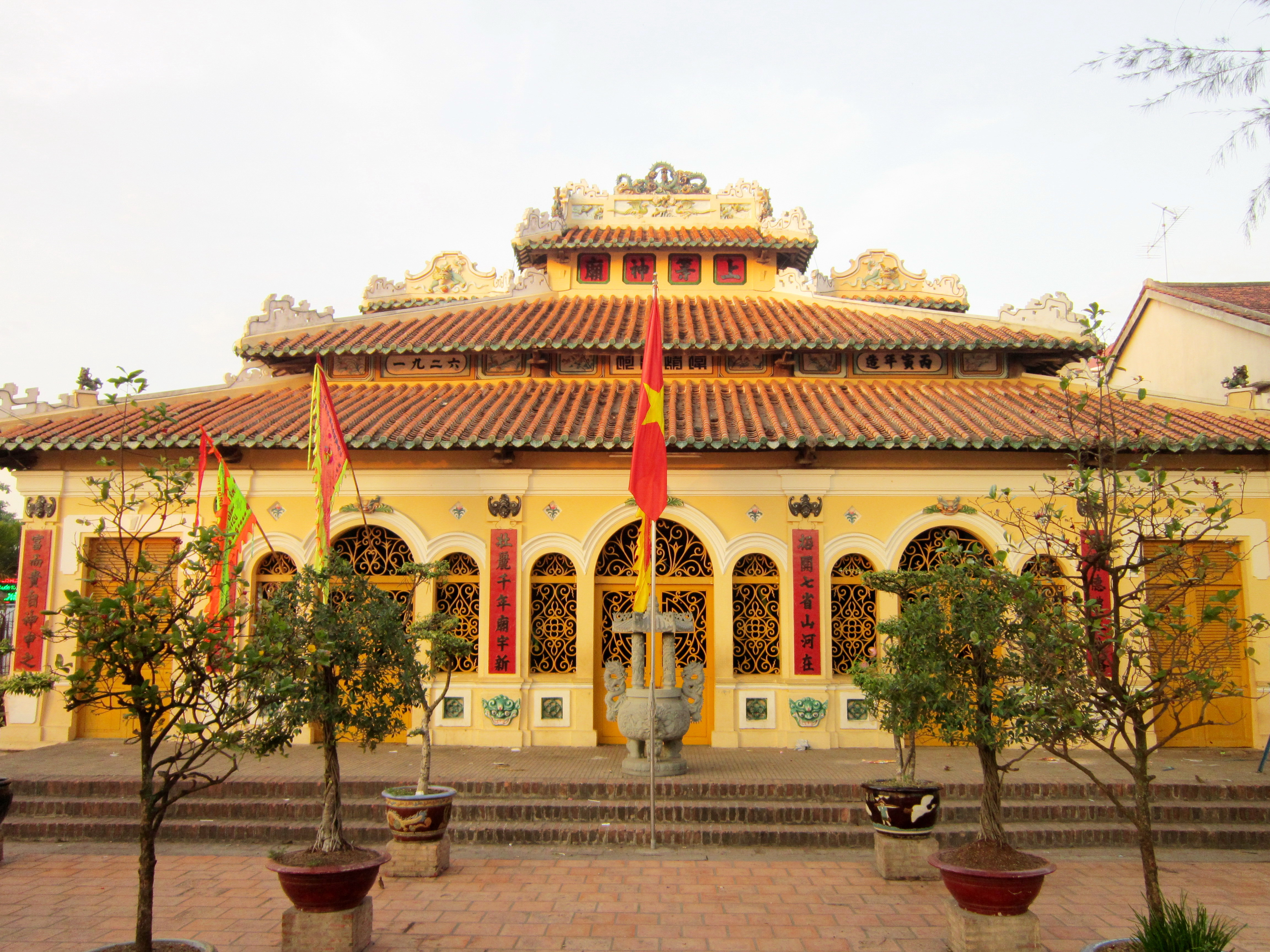 Đình Châu Phú tại chợ Châu Đốc (An Giang, Việt Nam), lập ra để thờ tướng Nguyễn Hữu Cảnh (1650-1700).